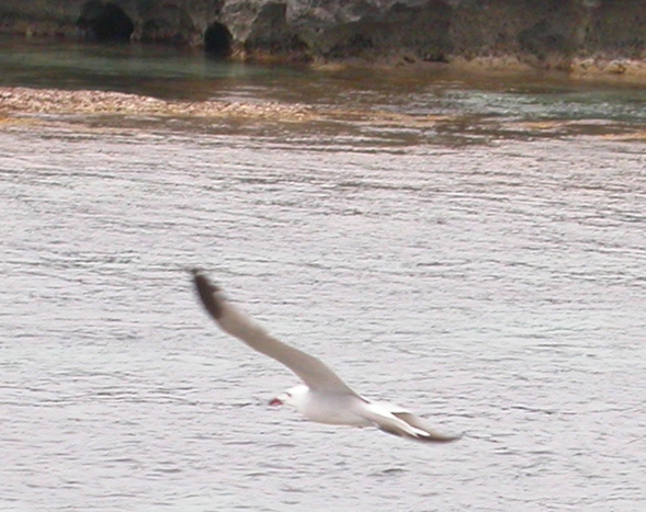 Korallenmöwe (Ichthyaetus audouinii) im Flug, Ort "Punta de ses Portes" auf Ibiza, Spanien